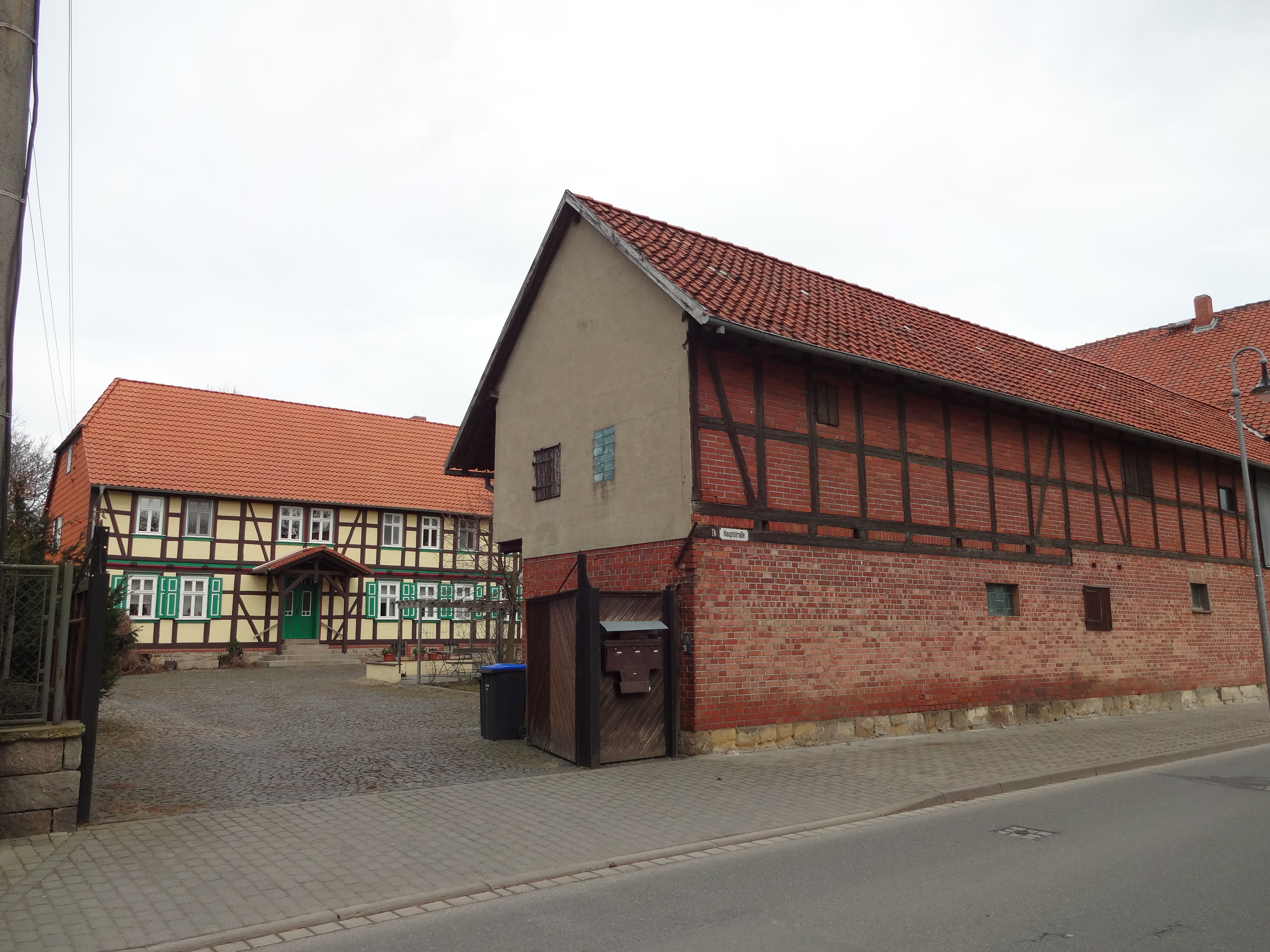 denkmalgeschützter Bauernhof in der Hauptstraße 1 in Minsleben, Ortsteil von Wernigerode